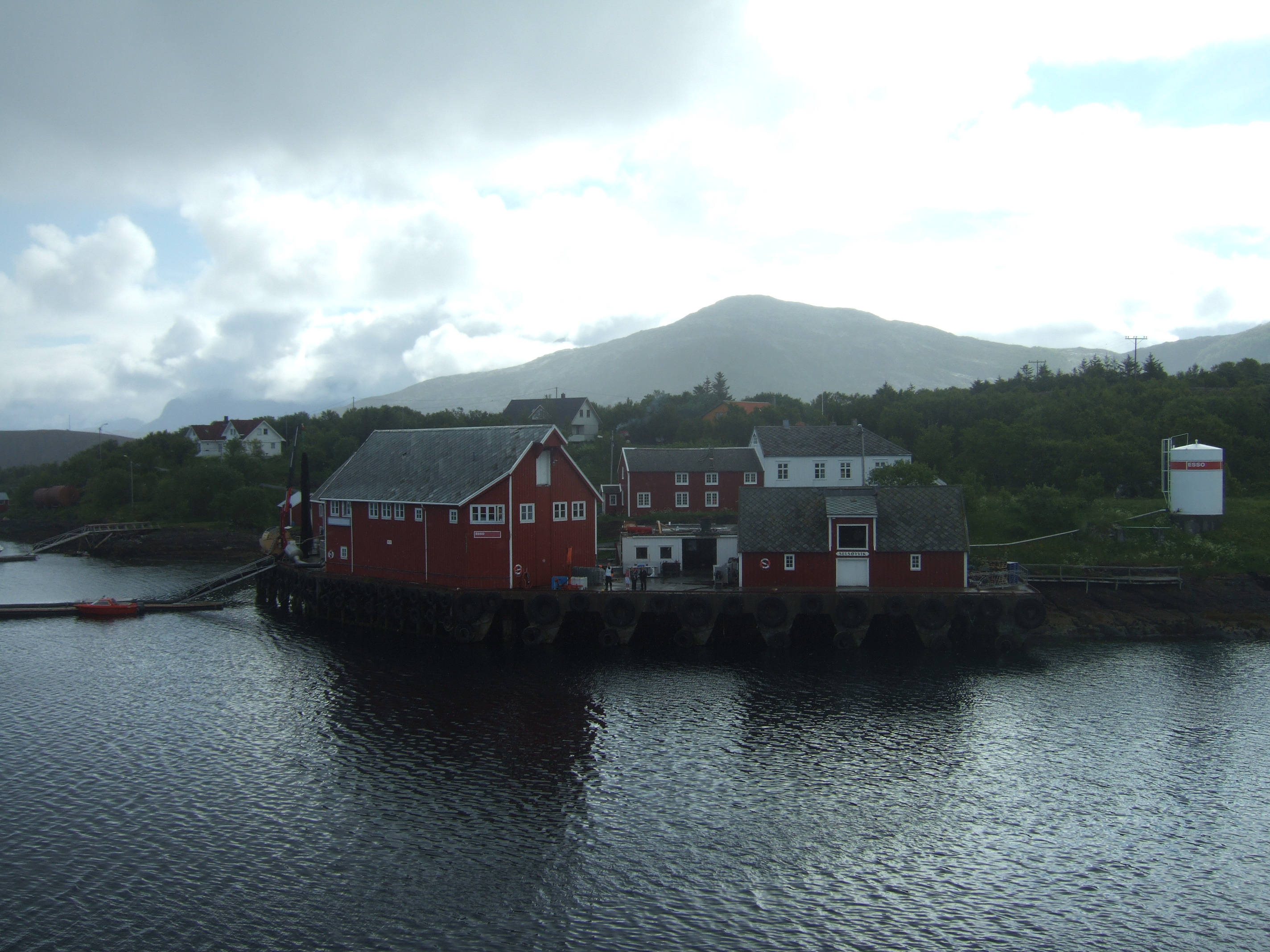 Selsøyvik Handelssted sett fra sjøen.